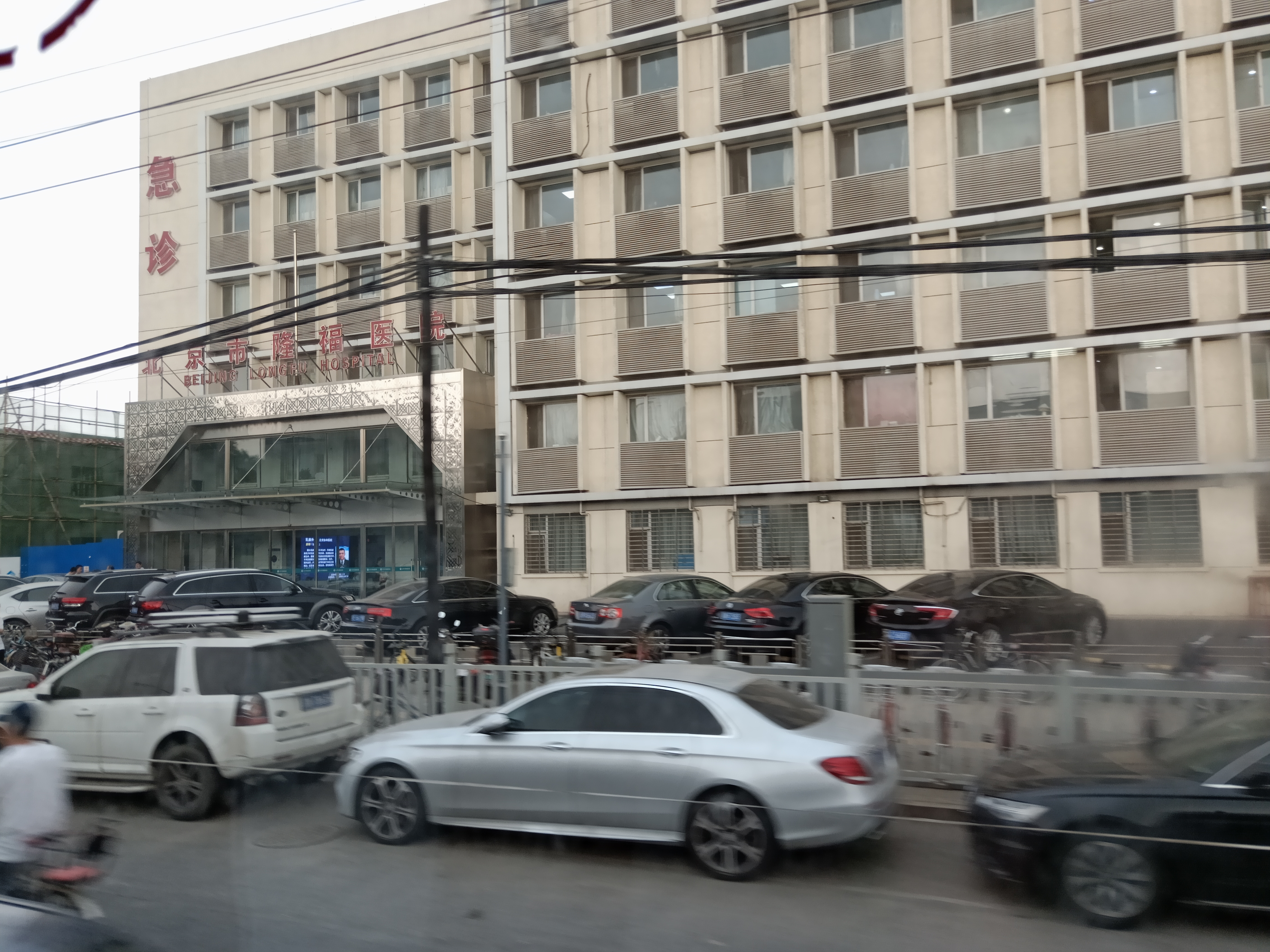 粵語: 北京市隆福醫院